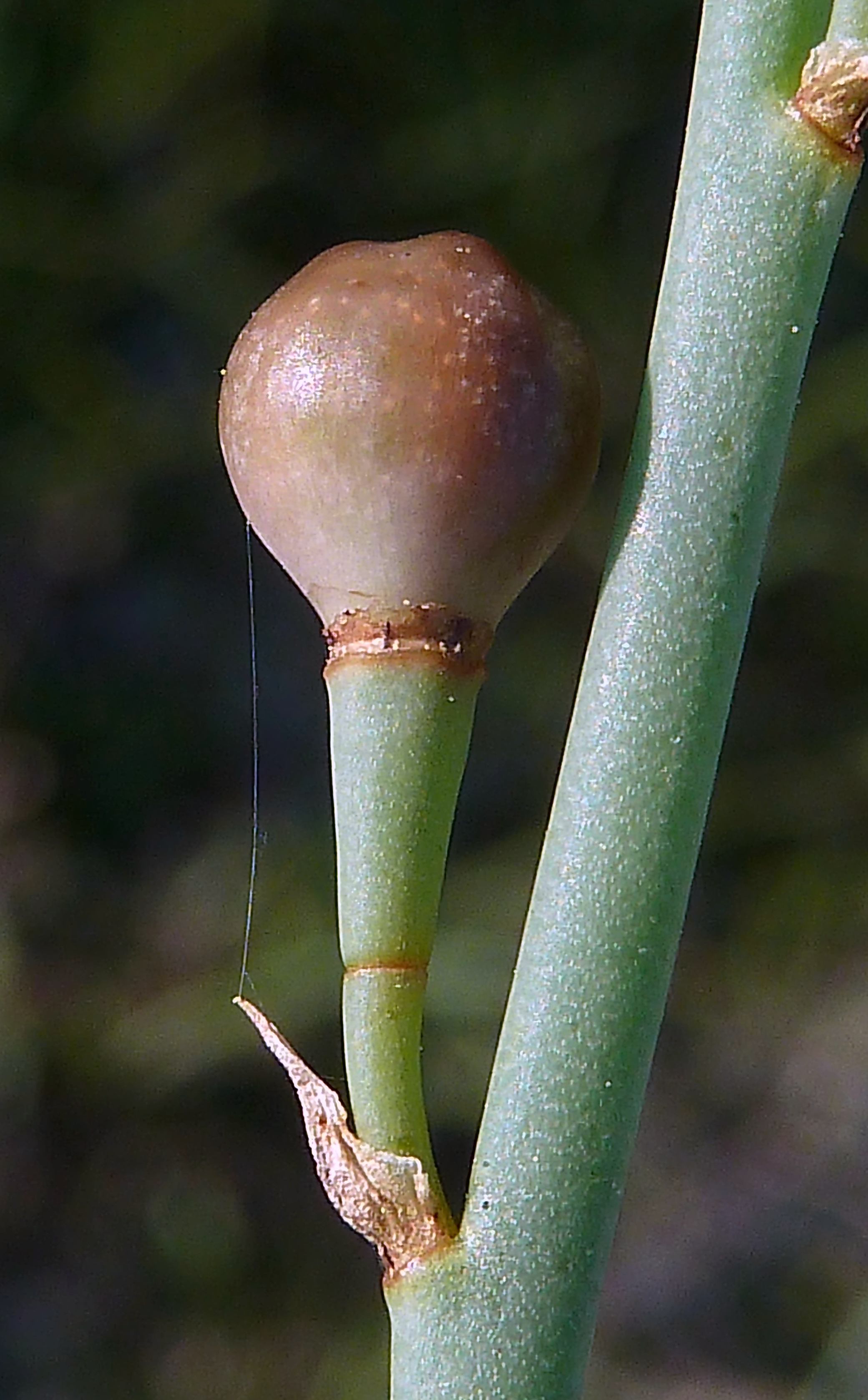 Asphodelus fistulosus (gamoncillo): Fruto semi-maduro - Camino de la Azarbe de Patricio, Albatera (Alicante, España)